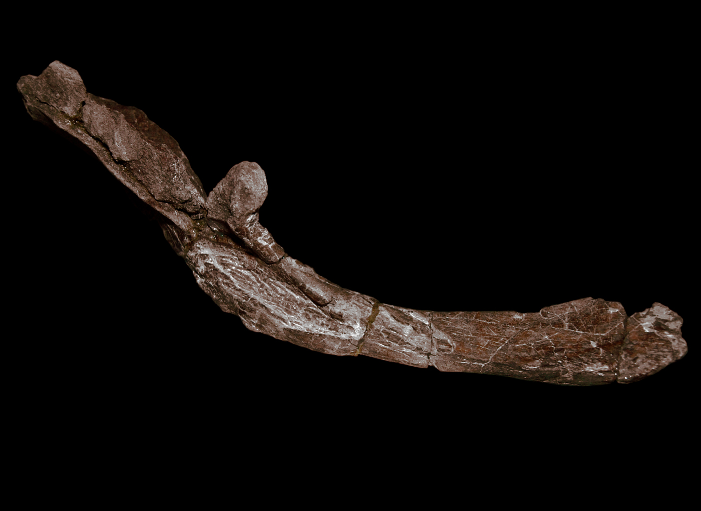 Babes Bolyai paleontology museum